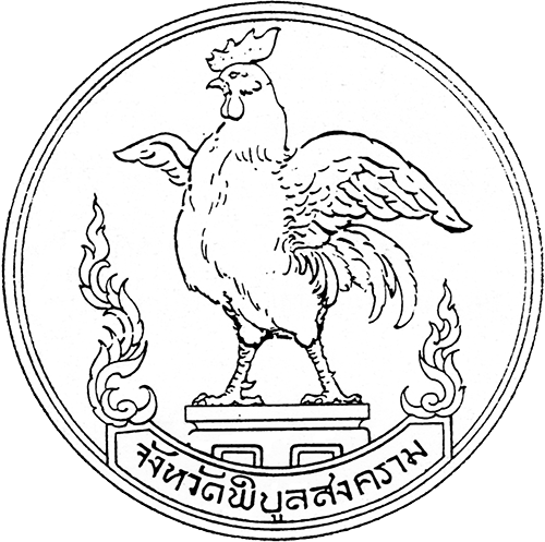 ตราประจำจังหวัดพิบูลสงคราม (พ.ศ. 2484 - 2489) ภาพจากหนังสือตราประจำจังหวัด กรมศิลปากรจัดพิมพ์ พ.ศ. 2542